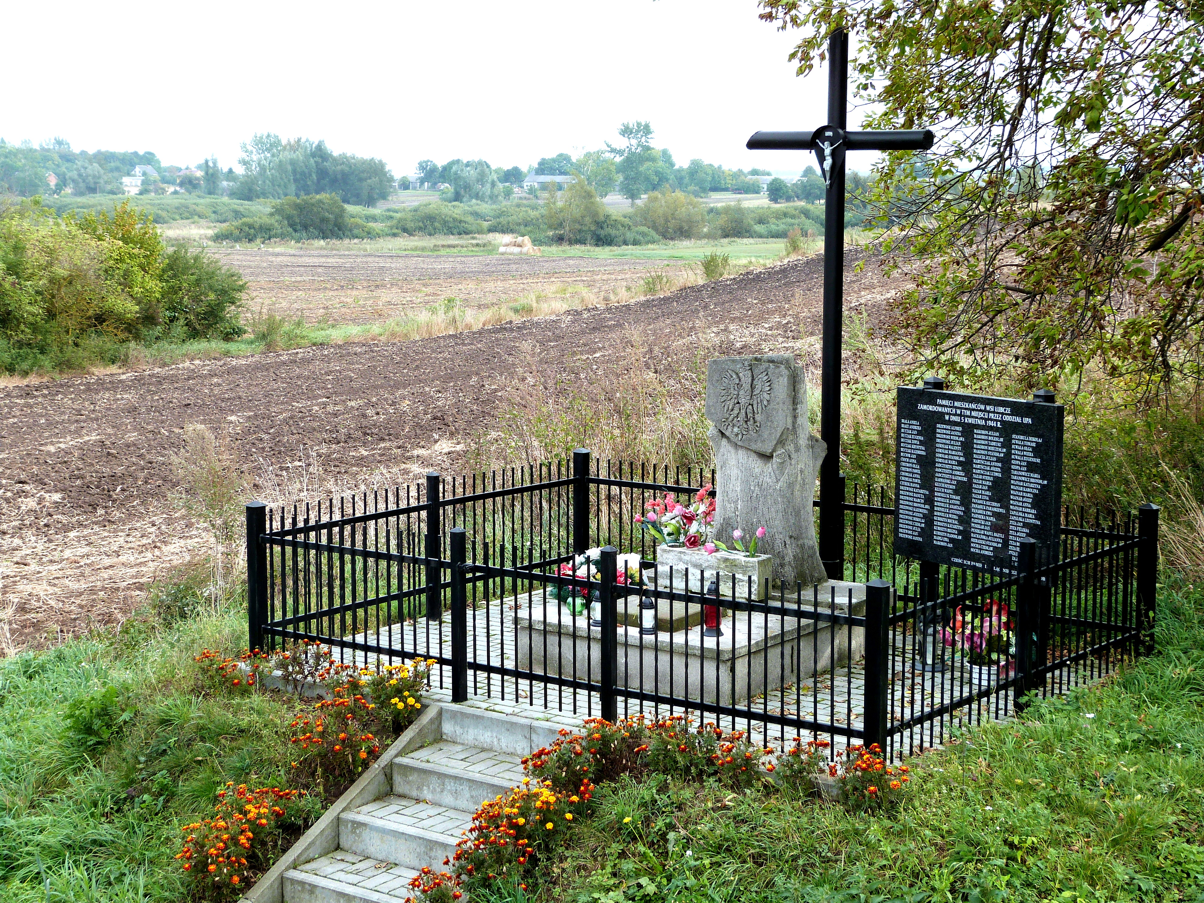 Łubcze - Pomnik Pamięci Zamordowanych przez UPA 5 kwietnia 1944 roku